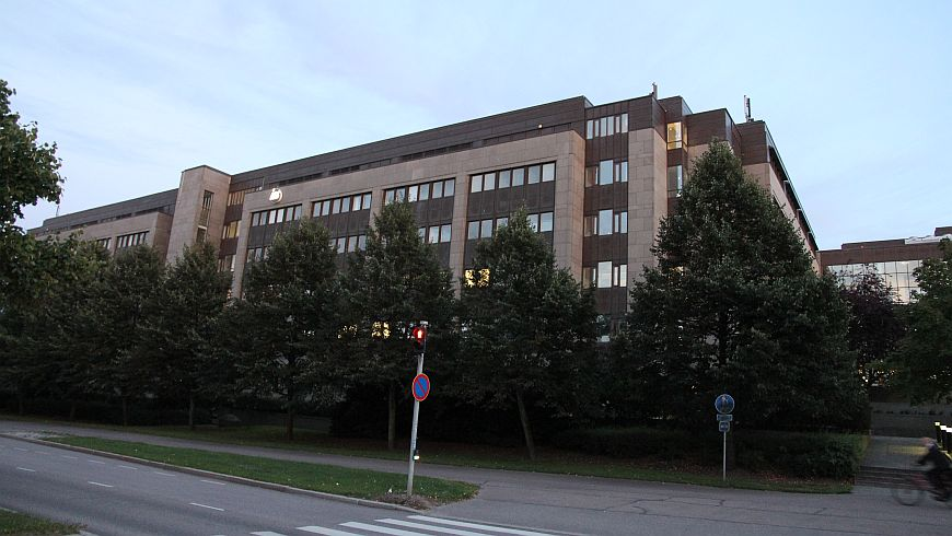 Yritystalo Colosseumia Vantaan Myyrmäessä. Rakennusryppäässä sijaitsee esimerkiksi kiinteistöpalveluyritys ISS Palvelut Oy:n pääkonttori. ISS Palvelut on osa tanskalaista ISS-konsernia. Huom: Muista säilyttää viittaus kuvaajaan, mikäli käytät kuvaa.